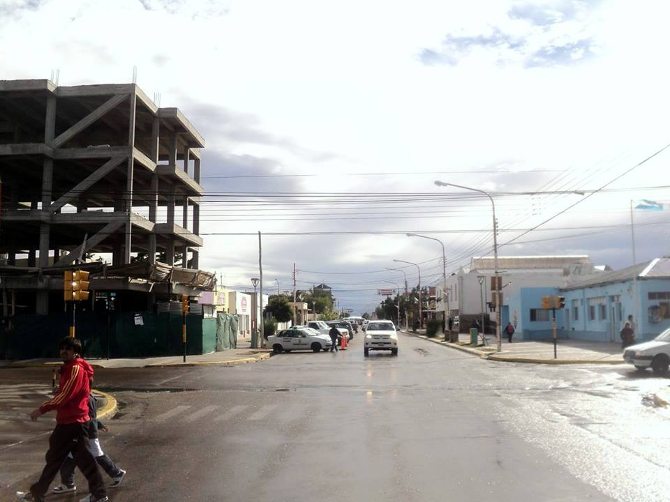 Centro truncadense en un día de lluvia. La altura máxima de los edificios es de 3 pisos.